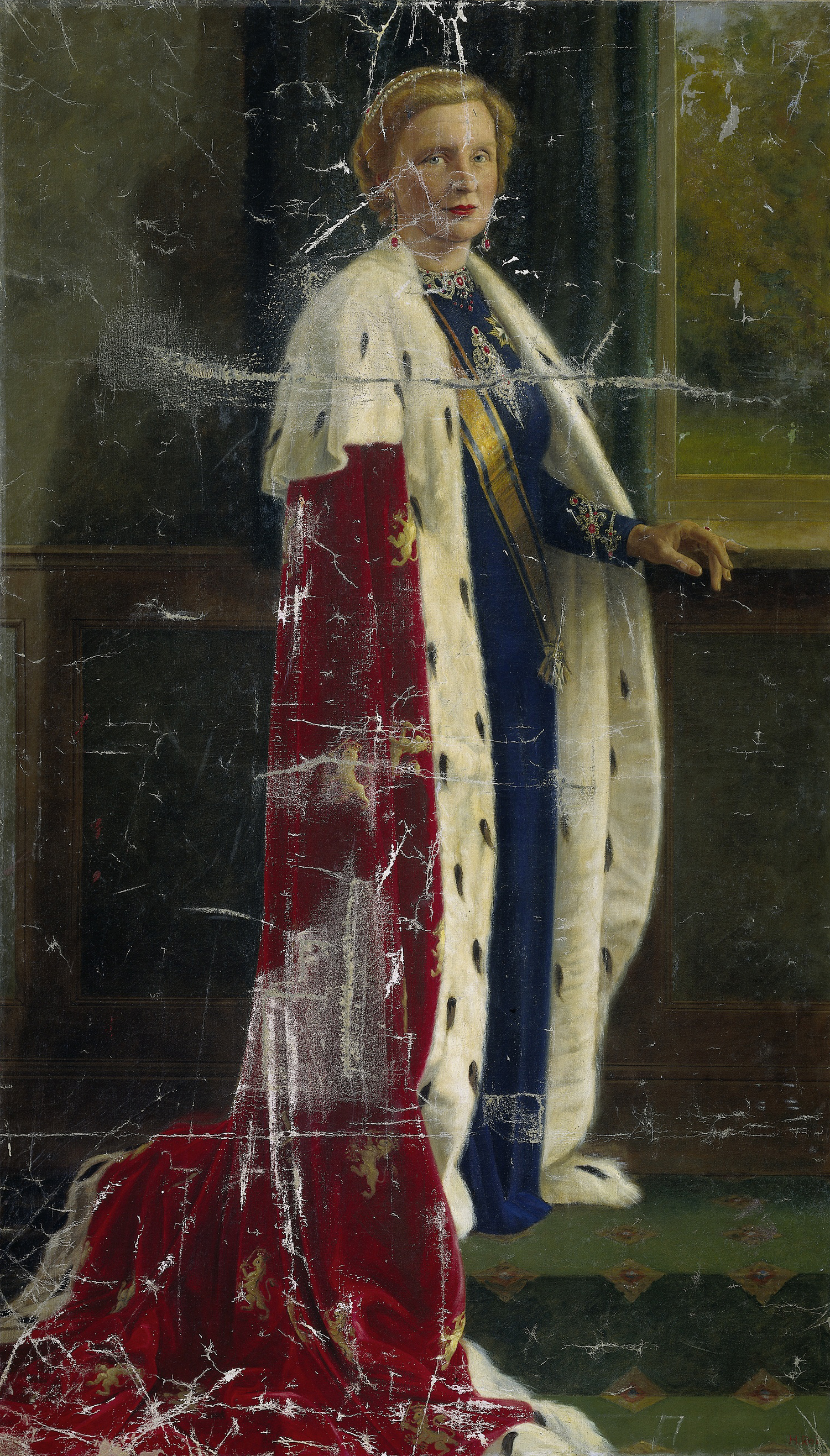 Portret van koningin Juliana der Nederlanden in haar kroningsgewaad, staande ten voeten uit bij een venster. Het schilderij is tijdens de rellen in Djakarta in 1960 zwaar beschadigd.